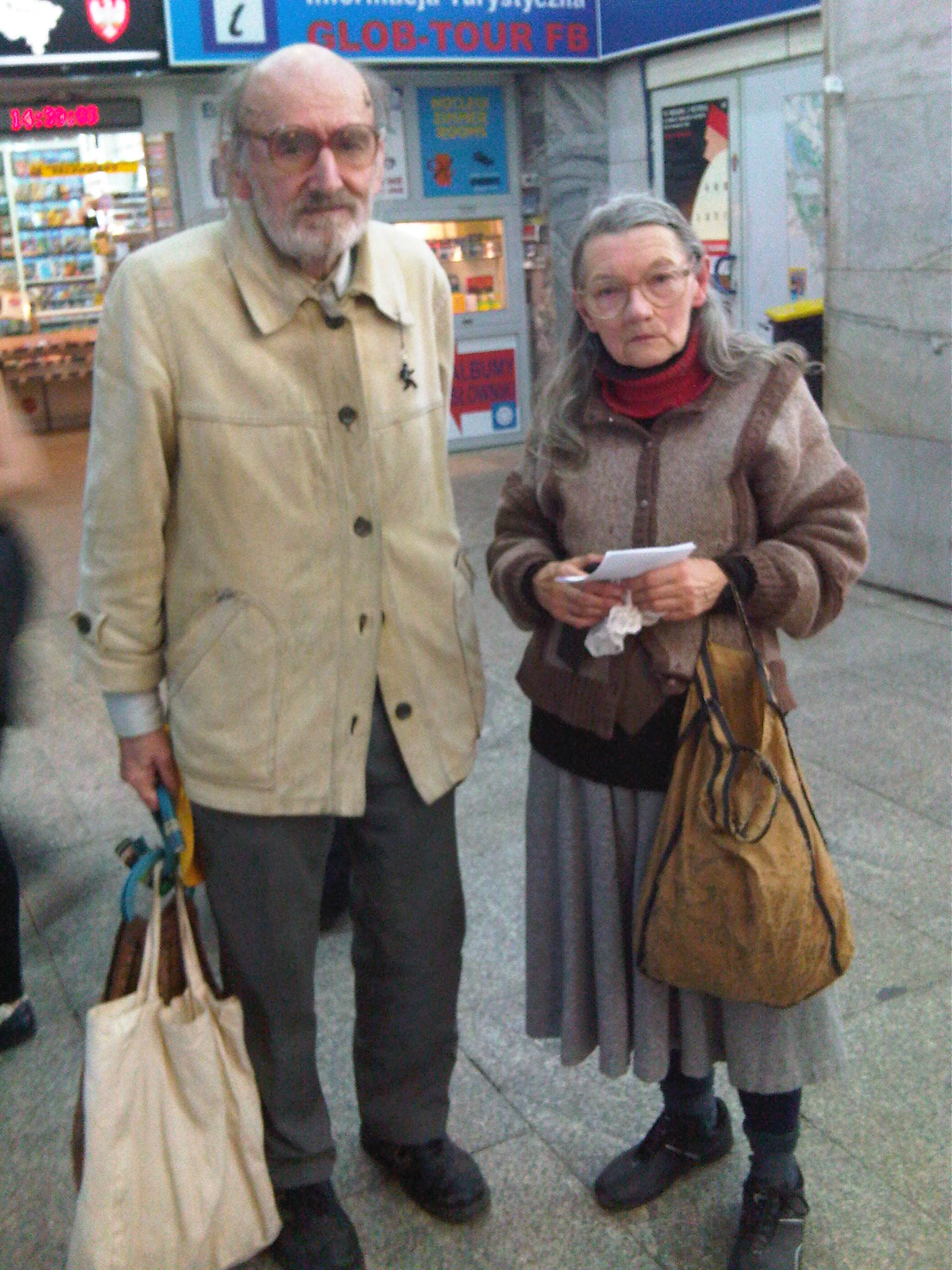 Państwo Maria i Bogdan Kalinowscy na dworcu Poznań Główny planujący podróż na festiwal 41. Lubuskie Lato Filmowe w Łagowie.